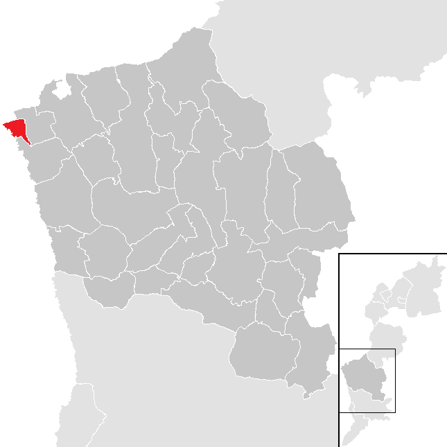 Bezirk Oberwart